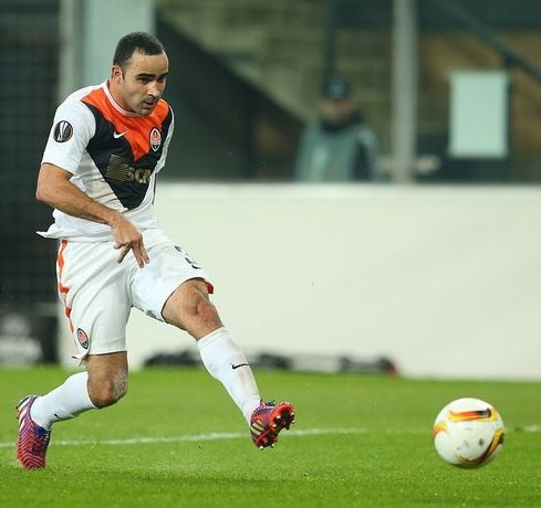 Ісмаїлі - футболіст Шахтаря (Донецьк)